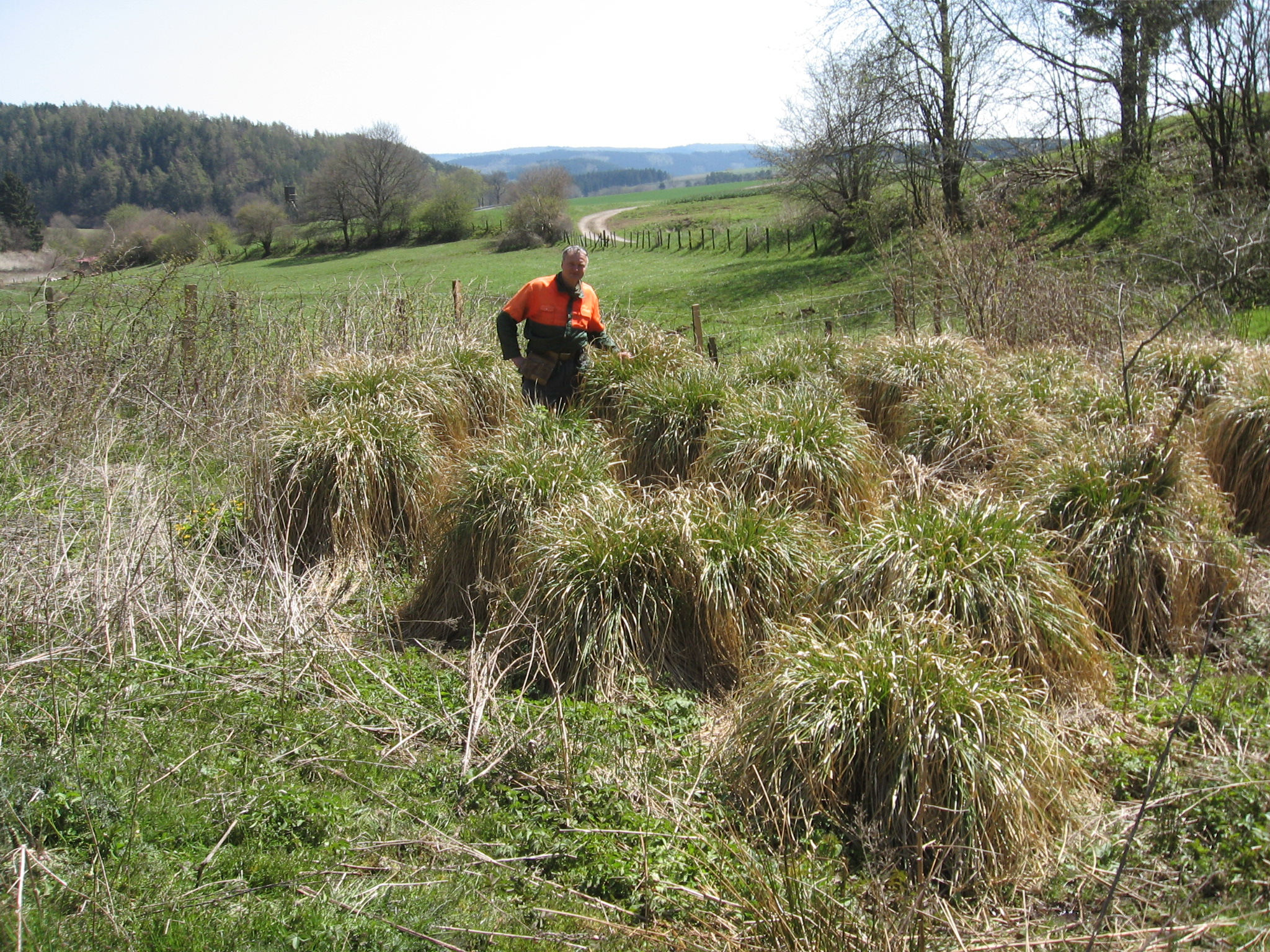 Rispen-Segge (Carex paniculata) im NSG Kartmecketal im Hochsauerland